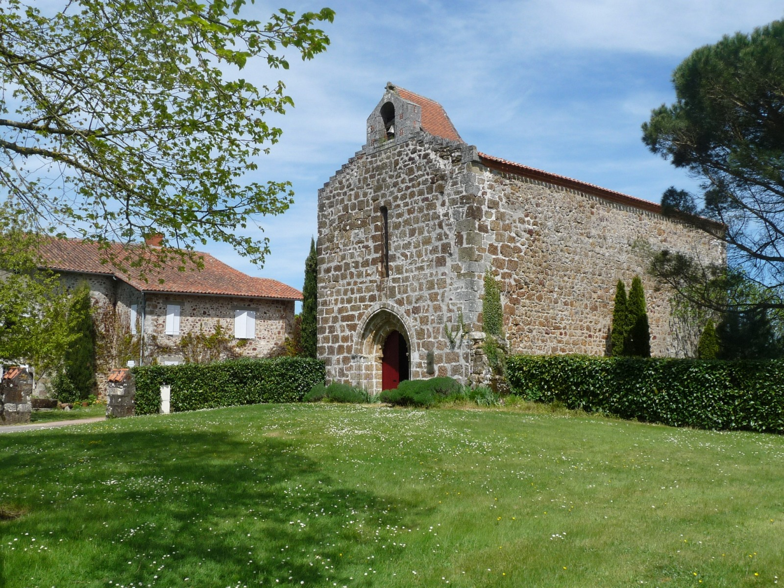 Chapelle et logis du Petit Madieu, Roumazières-Loubert, Charente, France